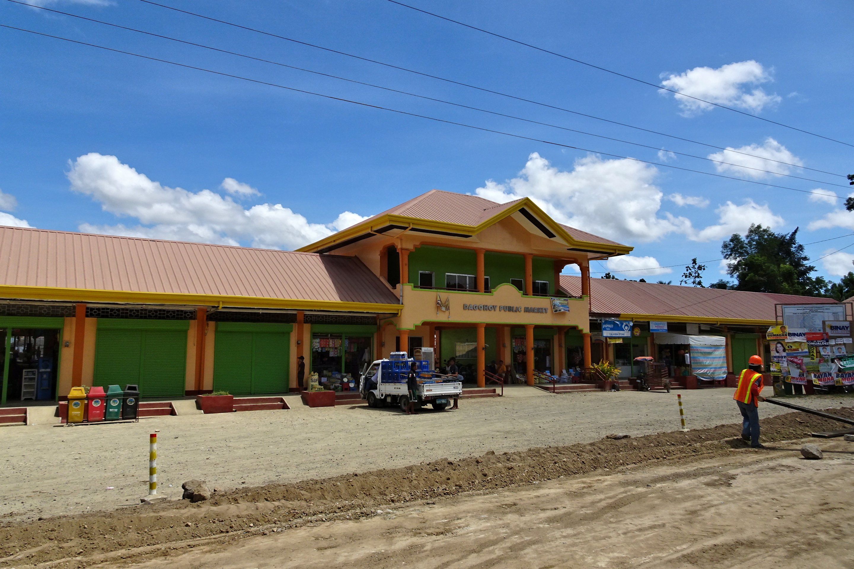 Dagohoy, Bohol, Philippines